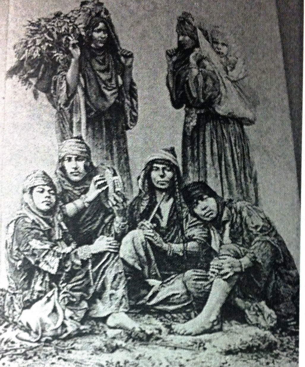 נשים טורקמניות 1895